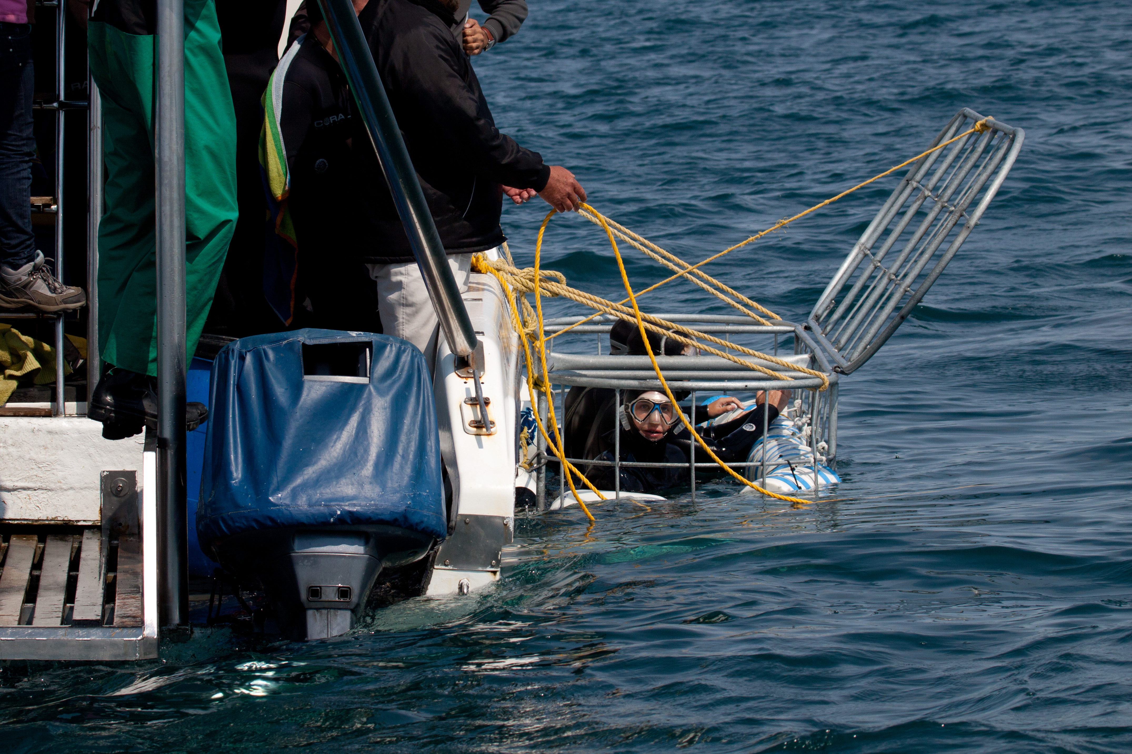 Haikäfigtauchen vor Gansbaai, Südafrika. Rund um die vorgelagerte Insel Dyer Island kommenden Weißen Haie (Carcharodon carcharias) in großer Zahl vor. Das Haitauchen im Käfig zieht viele Besucher an.